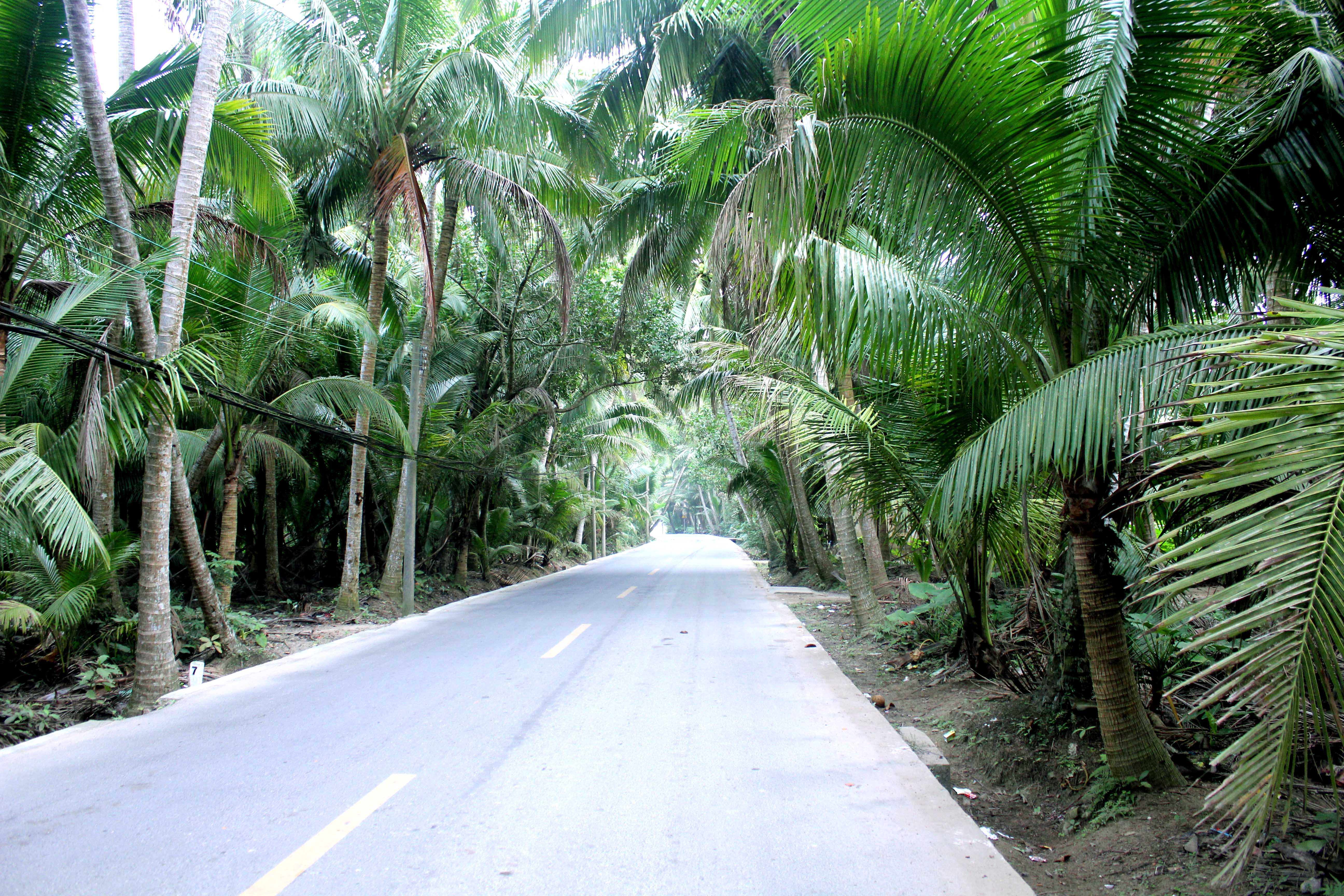 海南省文昌市东郊椰林